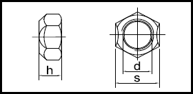 DIN 980